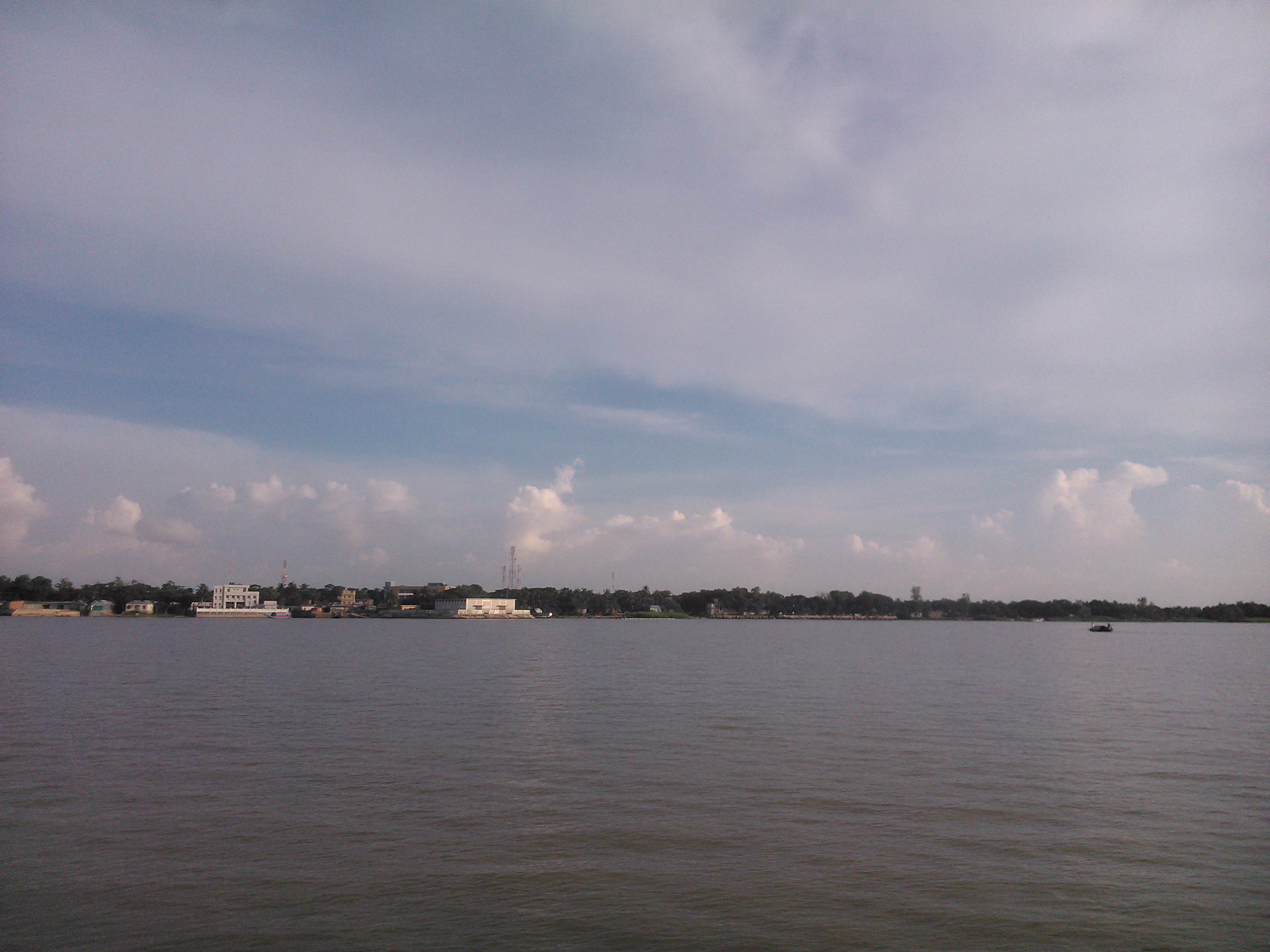 নাসিরনগরের নদীর পারের দৃশ্য